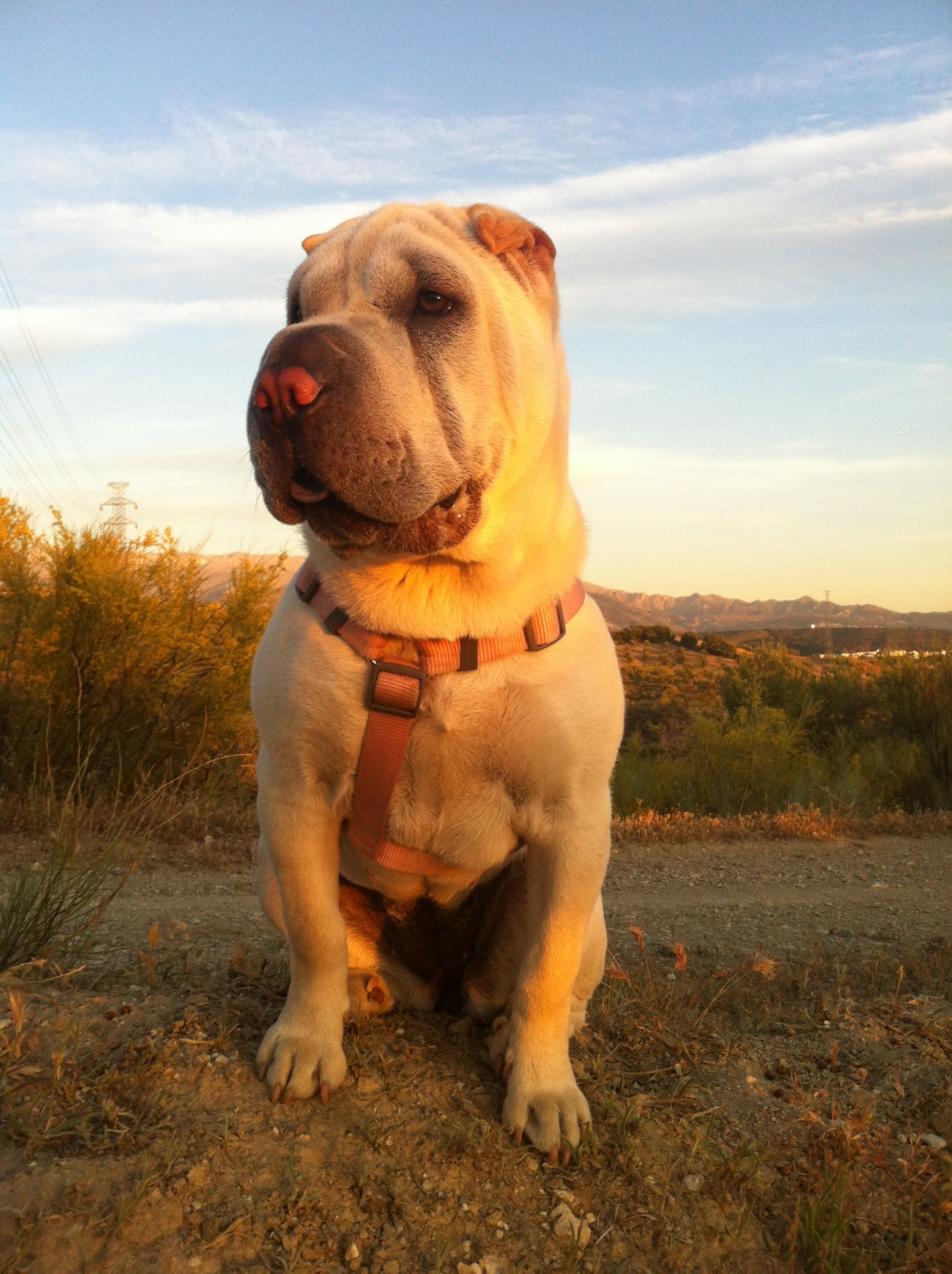 La línea china presenta un menor número de arrugas que la americana. Las hembras son de un tamaño menor a losmachos.